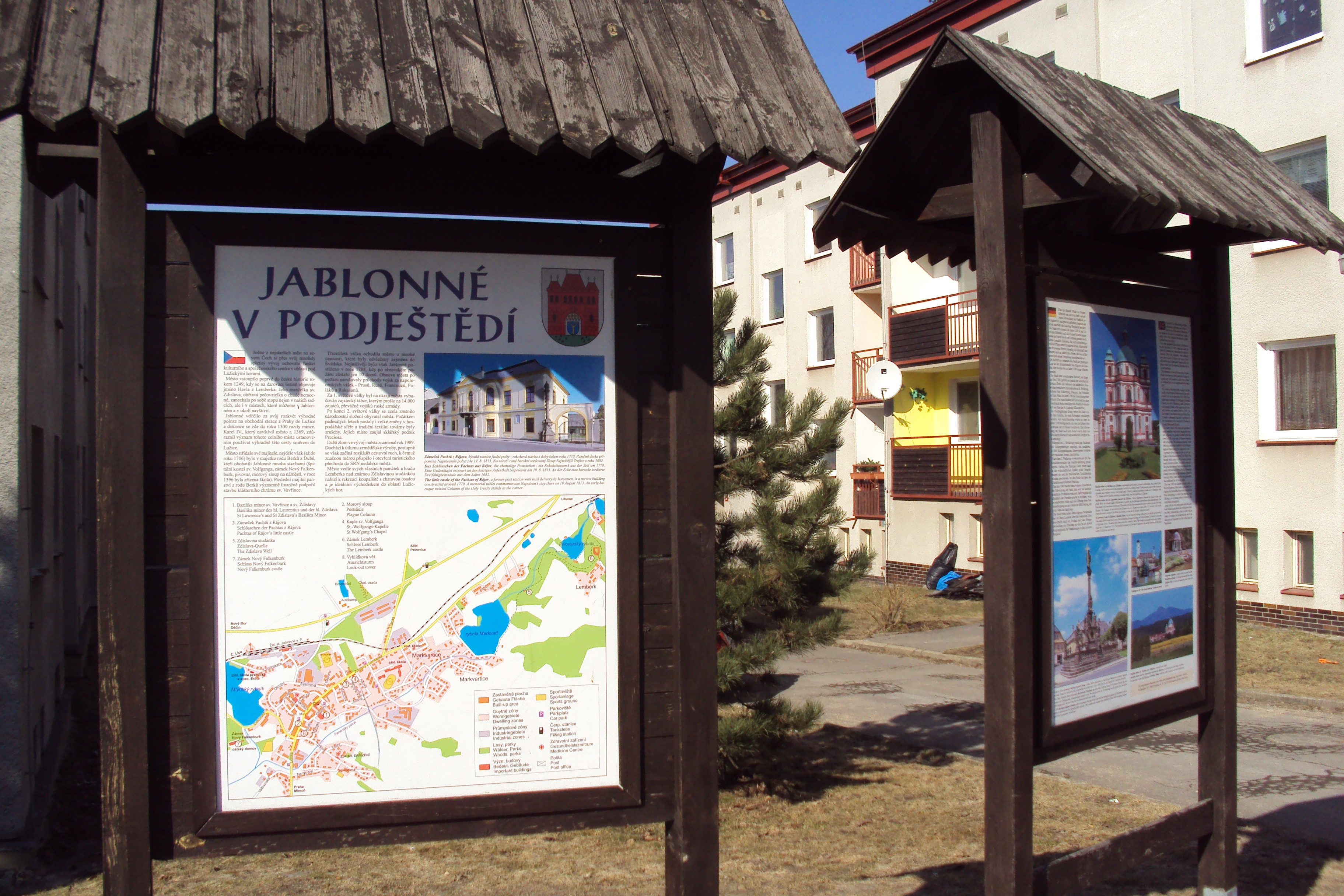 Přes ulici Pachtova zámečku jsou infopanely s jeho popisek i fotkou